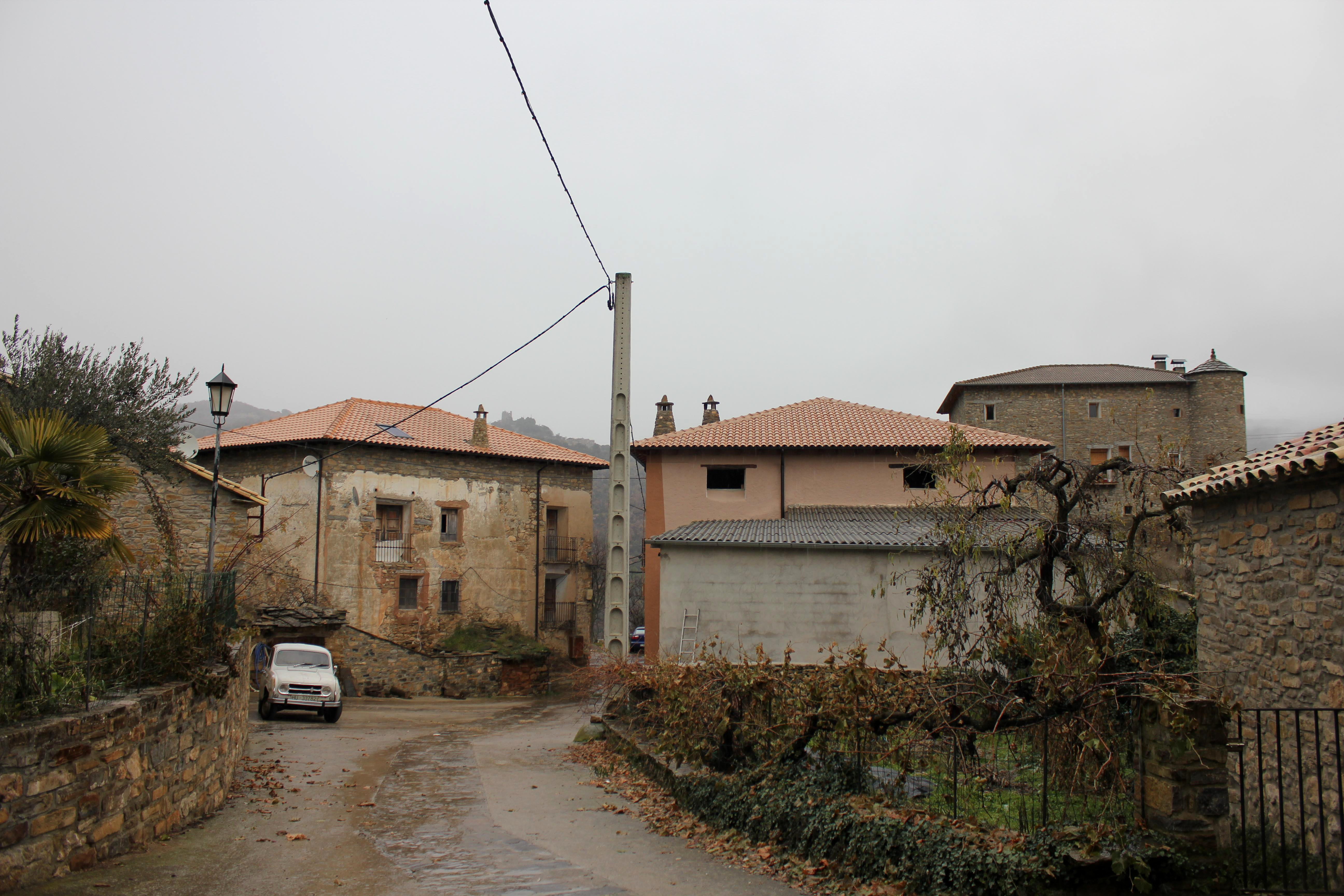 Aragonés: Plano cheneral de Salinas de Trillo (A Fueva, Sobrarbe).